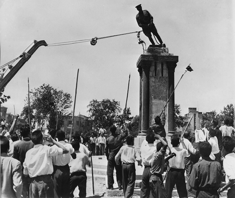 مخالفان شاه تندیس رضاشاه را در میدان توپخانه فرو می اندازند. 25 تا 27 مرداد 1332